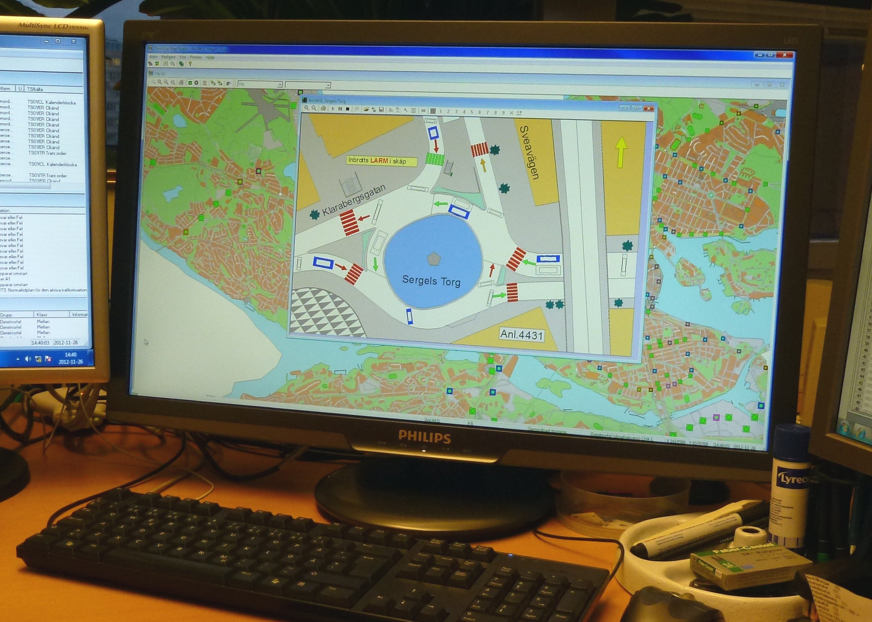 Trafikkontoret signalstyrning 2012 (Sergels torg)